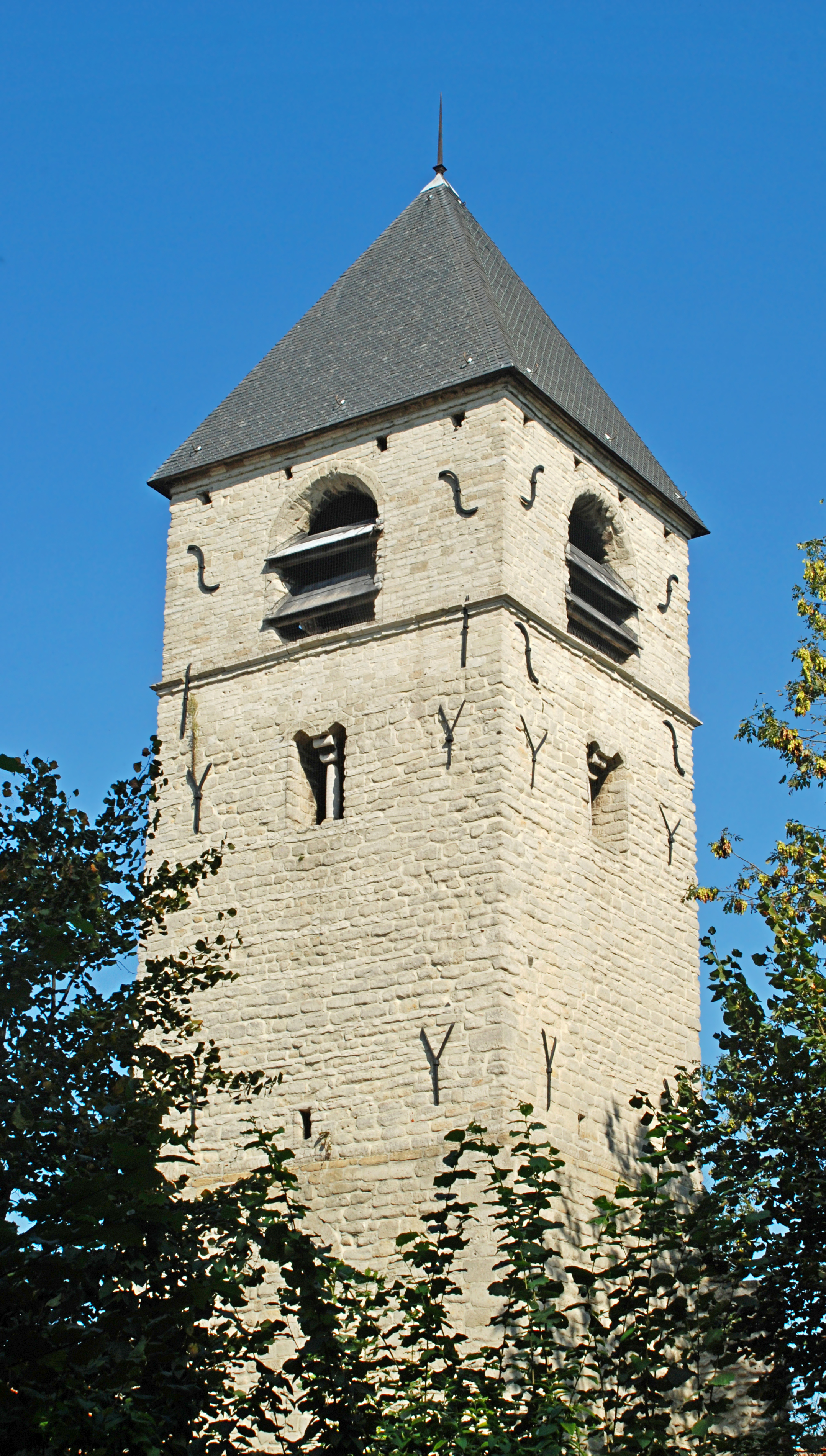 Belgique - Bruxelles - Tour romane de Neder-Heembeek